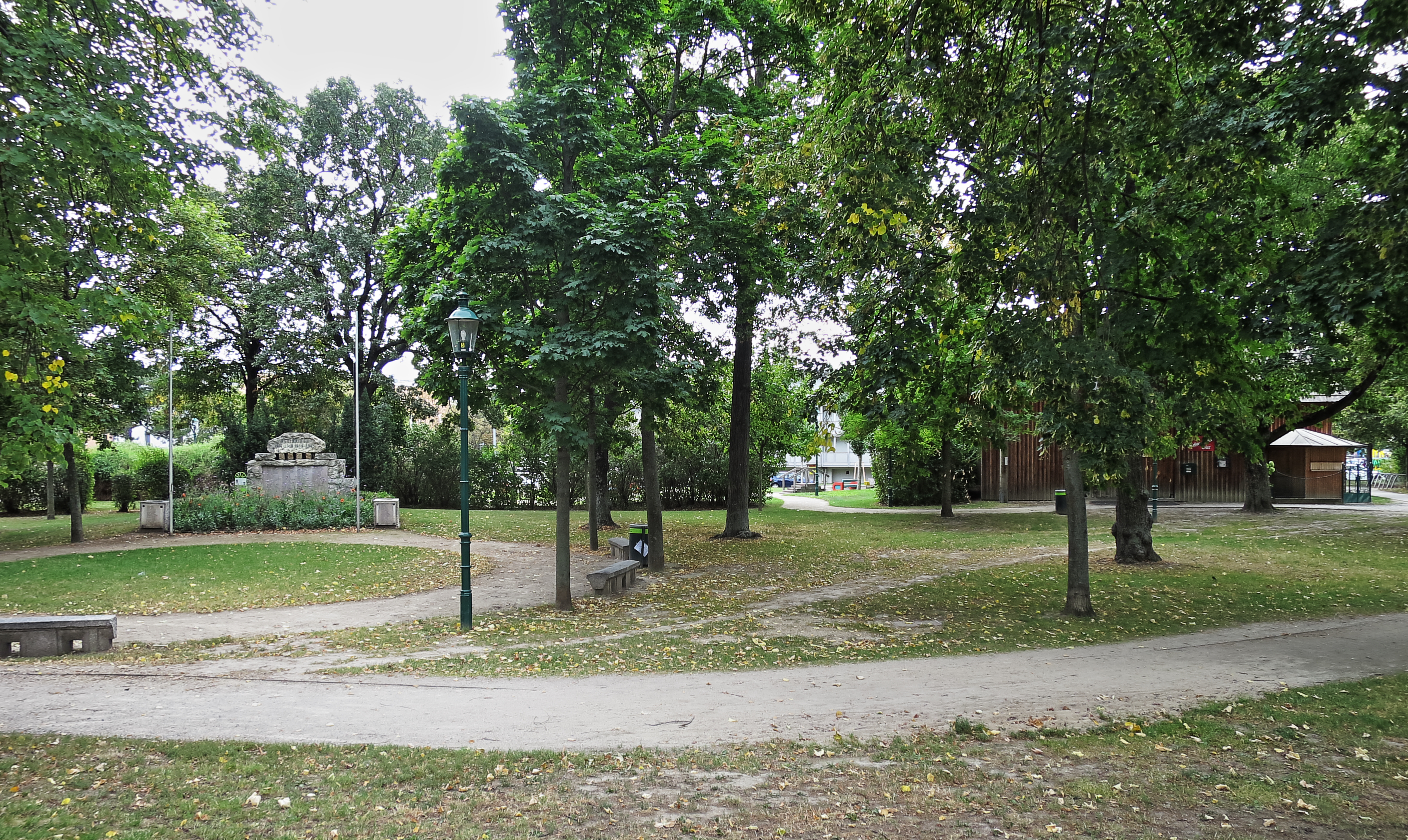 Jazzpark Essling in Wien-Donaustadt